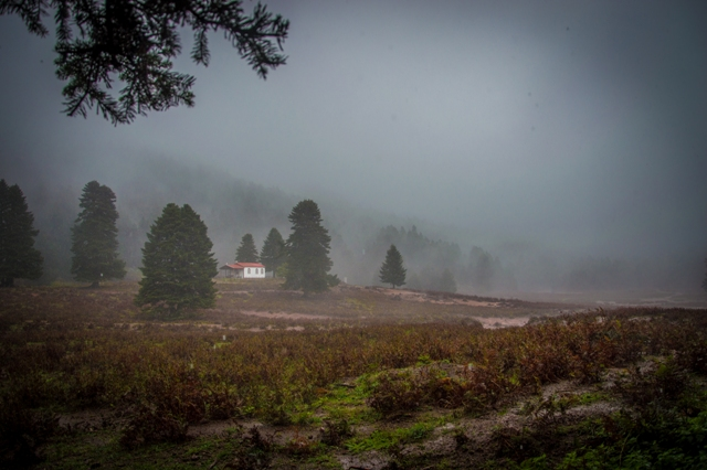 Οροπέδιο Ταναίδας